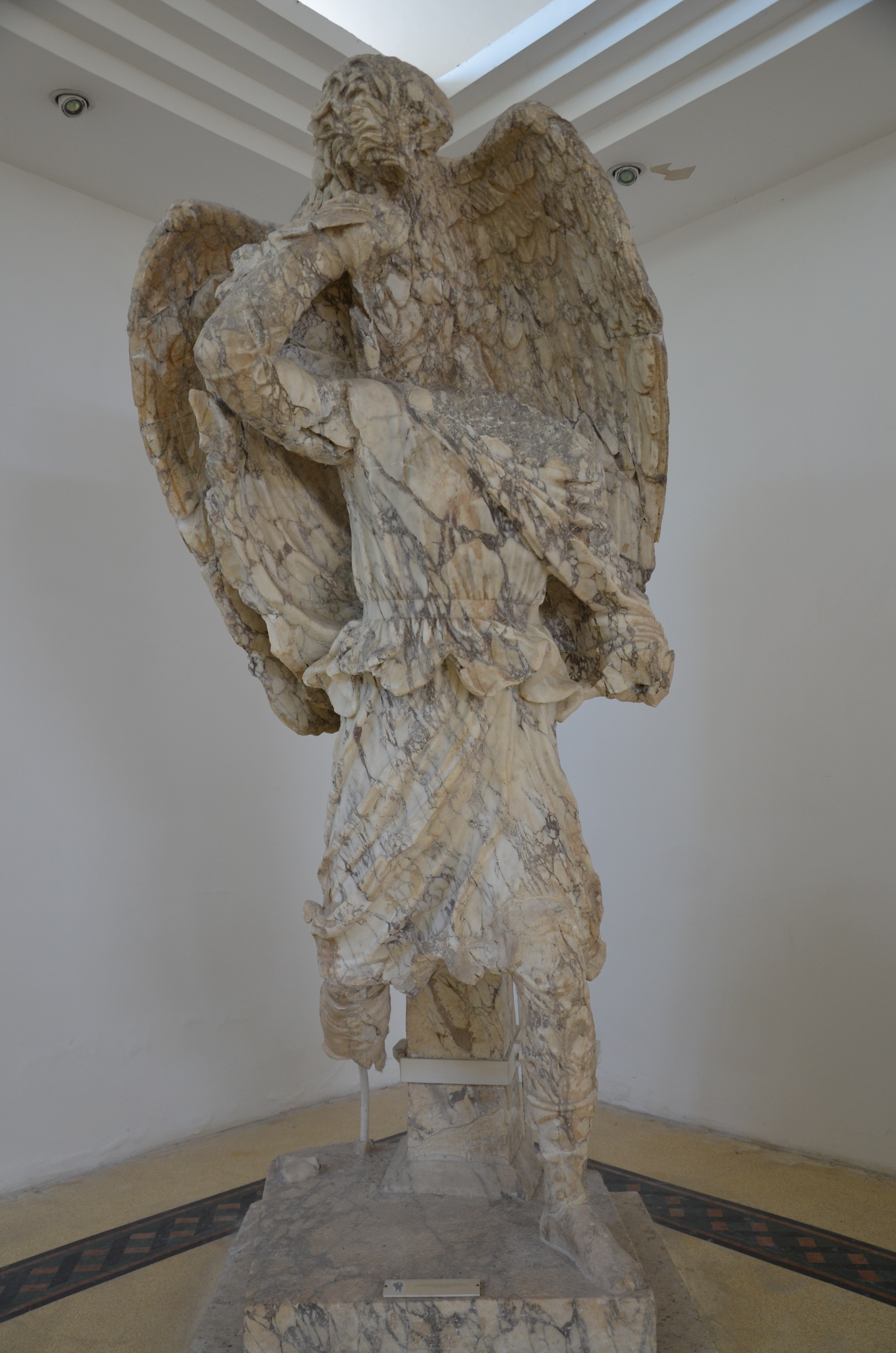 Sperlonga